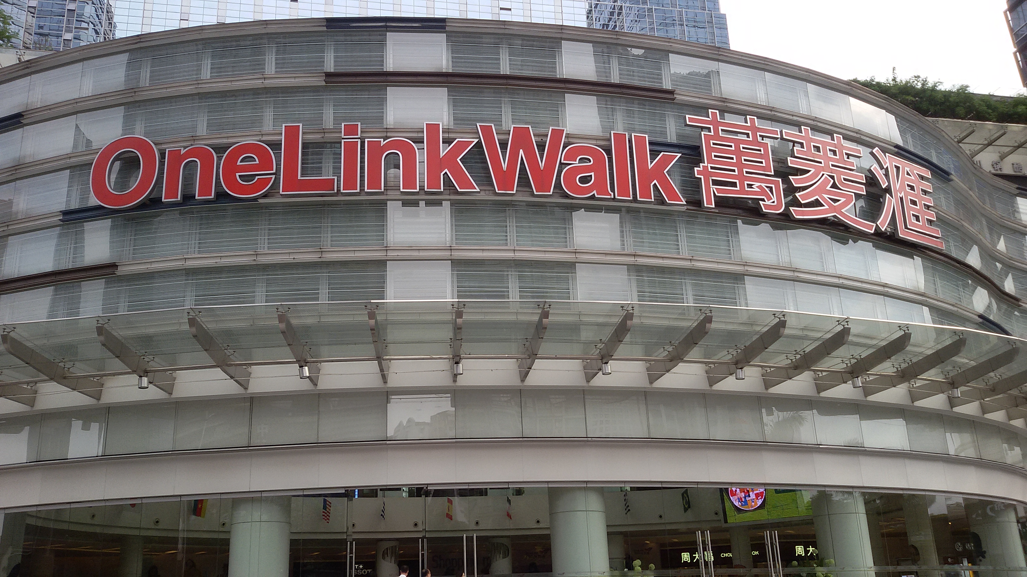 粵語: 萬菱匯